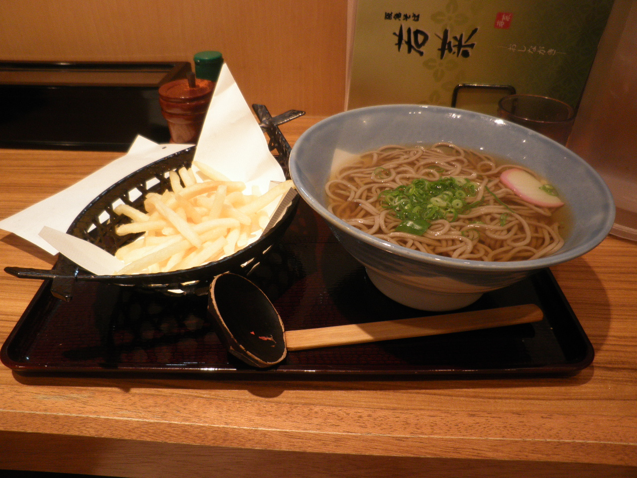 阪急そば若菜十三店のポテそば